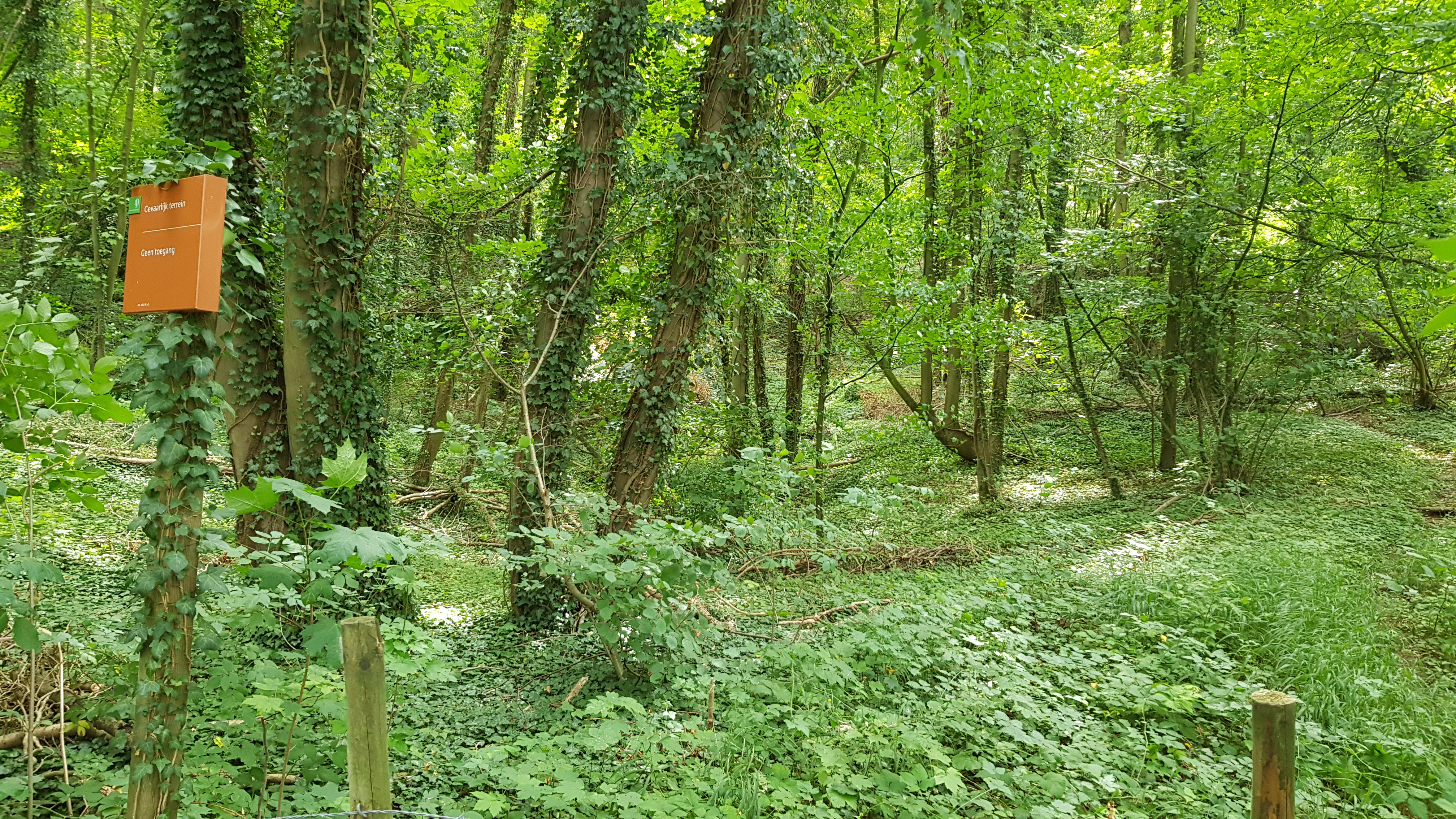 Groeve de Grote Hel in het Savelsbos, Gronsveld, Nederland